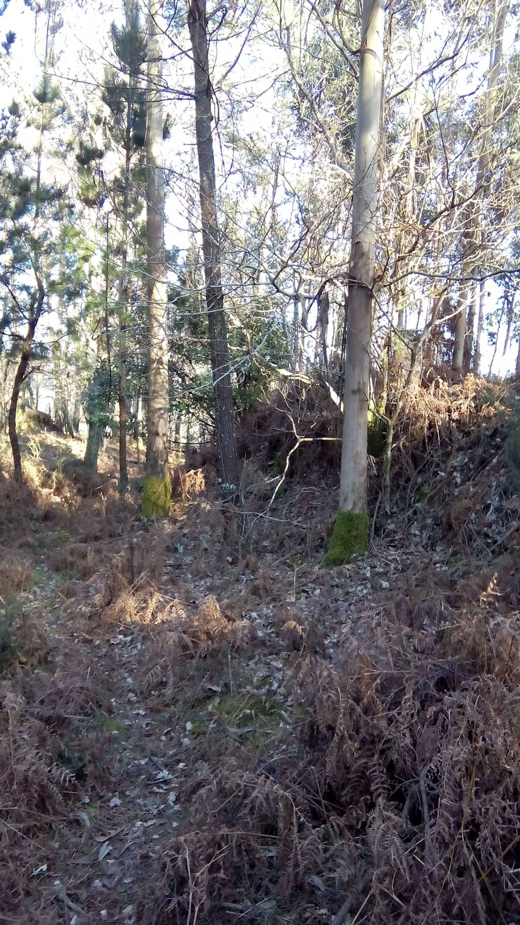 Vista das defensas do castro de Rupiallo, San Sadurniño.